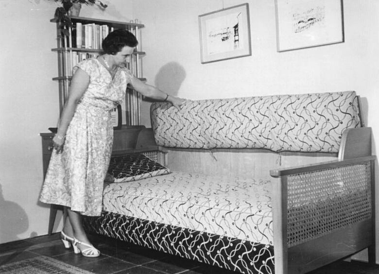 Berlin, Musterwohnzimmer, Schlafcouch Zentralbild Hesse-Mihatsch 19.9.1956 Ausstellung "Die Welt der Frau". Die hohe Zahl der Besucher, die bisher die Ausstellung "Die Welt der Frau" in der Deutschen Sporthalle in Berlin gesehen haben, - bisher wurden weit über 10.000 Personen gezählt - beweist, dass es sehr interessante Dinge in dieser Schau zu sehen gibt. Neben vielen Neuheiten, die der Hausfrau das Leben erleichtern, und den Werktätigen den Feierabend schöner und bequemer gestalten helfen, werden auch die Zimmereinrichtungen gezeigt, die jeder Teilnehmer an der großen Tombola zum 7. Jahrestag der DDR gewinnen kann. UBz: Neu ist auch diese Schlafcouch. Die Betten werden nicht wie bisher im Bettkasten, sondern im Rückenteil untergebracht. (siehe auch Bild 8)